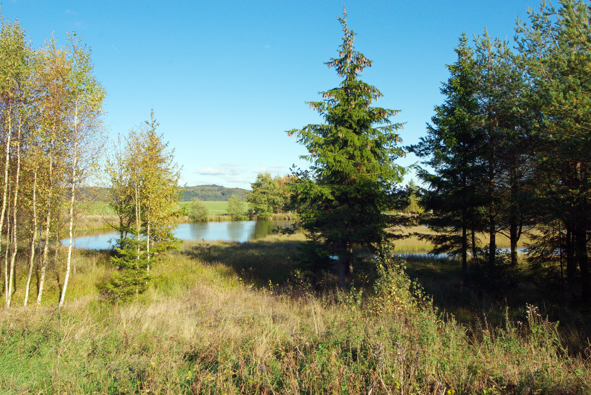 rybníček v Evropsky významné lokalitě Nadlesí, okres Sokolov